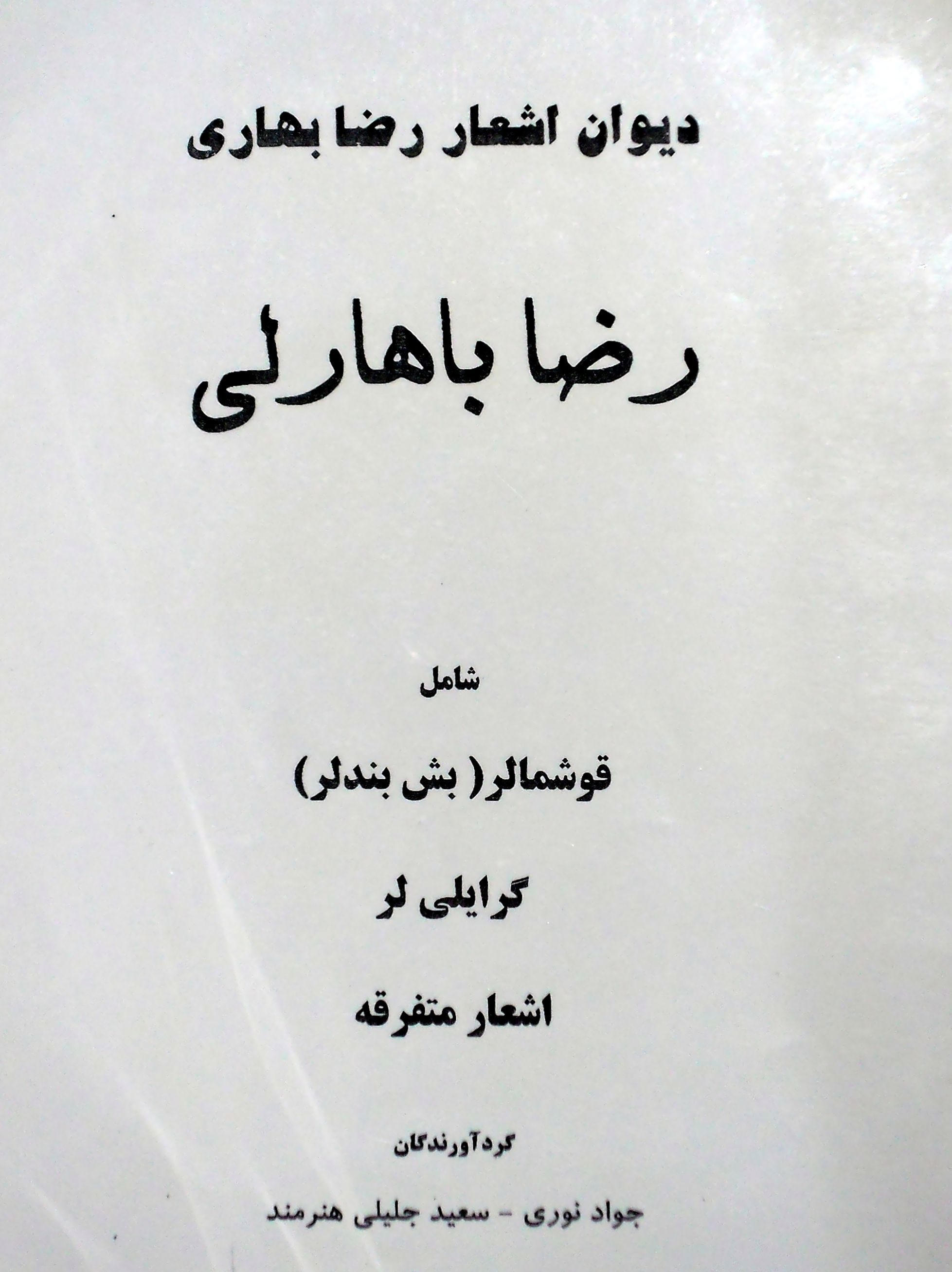 کتاب اشعار رضا بهاری